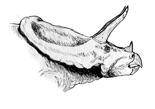 Head of Torosaurus, a ceratopian dinosaur